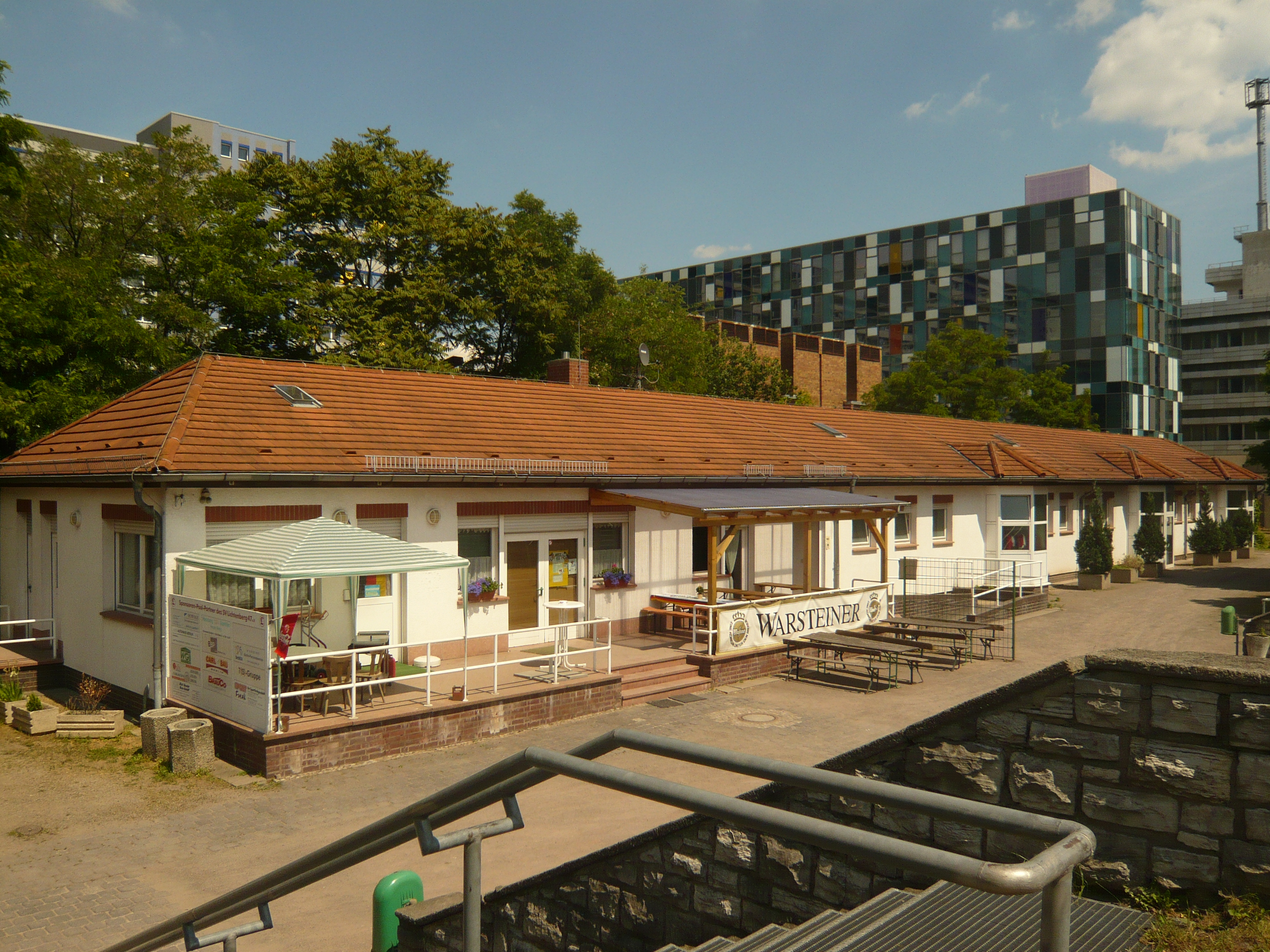 Berlin-Lichtenberg: Vereinsheim Lichtenberg 47 in der Normannen-/Ruschestraße